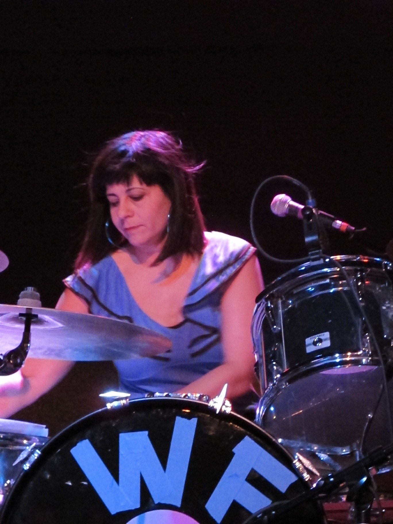 Wild Flag